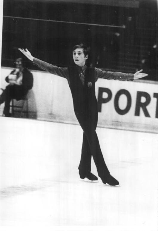 Bernd Wunderlich ADN-ZB CTK-Tele-12.11.72 Prag: Eiskunstlaufwettbewerb um den Goldenen Schlittschuh. Der DDR-Läufer Bernd Wunderlich bei seinem Kür-Lauf.